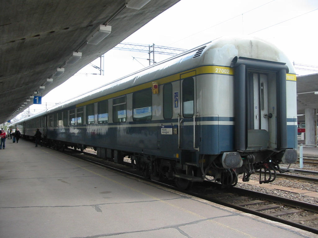 Finskt "blått" snälltåg på Kouvola järnvägsstation. De blåa vagnarna var de som i huvudsak användes i finska snälltåg från 1970-talet till 2000-talet, då de i huvudsak ersattes av intercity- och pendolino-tåg. Förstaklasskupén närmast utmärkt med gul rand.